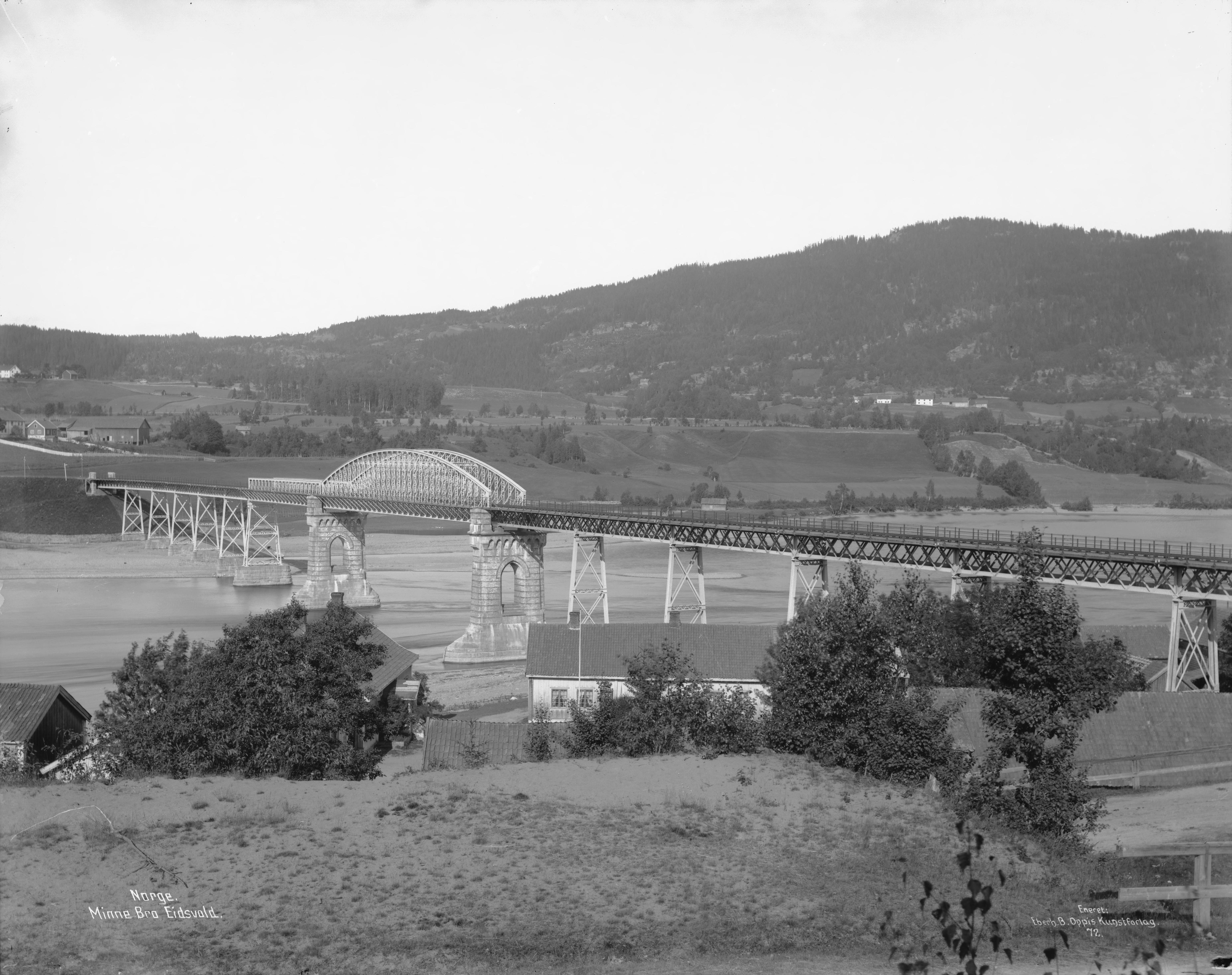 Påskrift negativ: Norge. Minne Bro Eidsvold. Eneret: Eberh. B. Oppis Kunstforlag. 72 Påskrift konvolutt: B-42 Eidsvoll. Minnesund bro og omliggende gårder. [Riksantikvaren] Sted: Minnesund bro,Mjøsa Kommune: Eidsvoll Fylke: Akershus Tagger: landskap innsjø bro